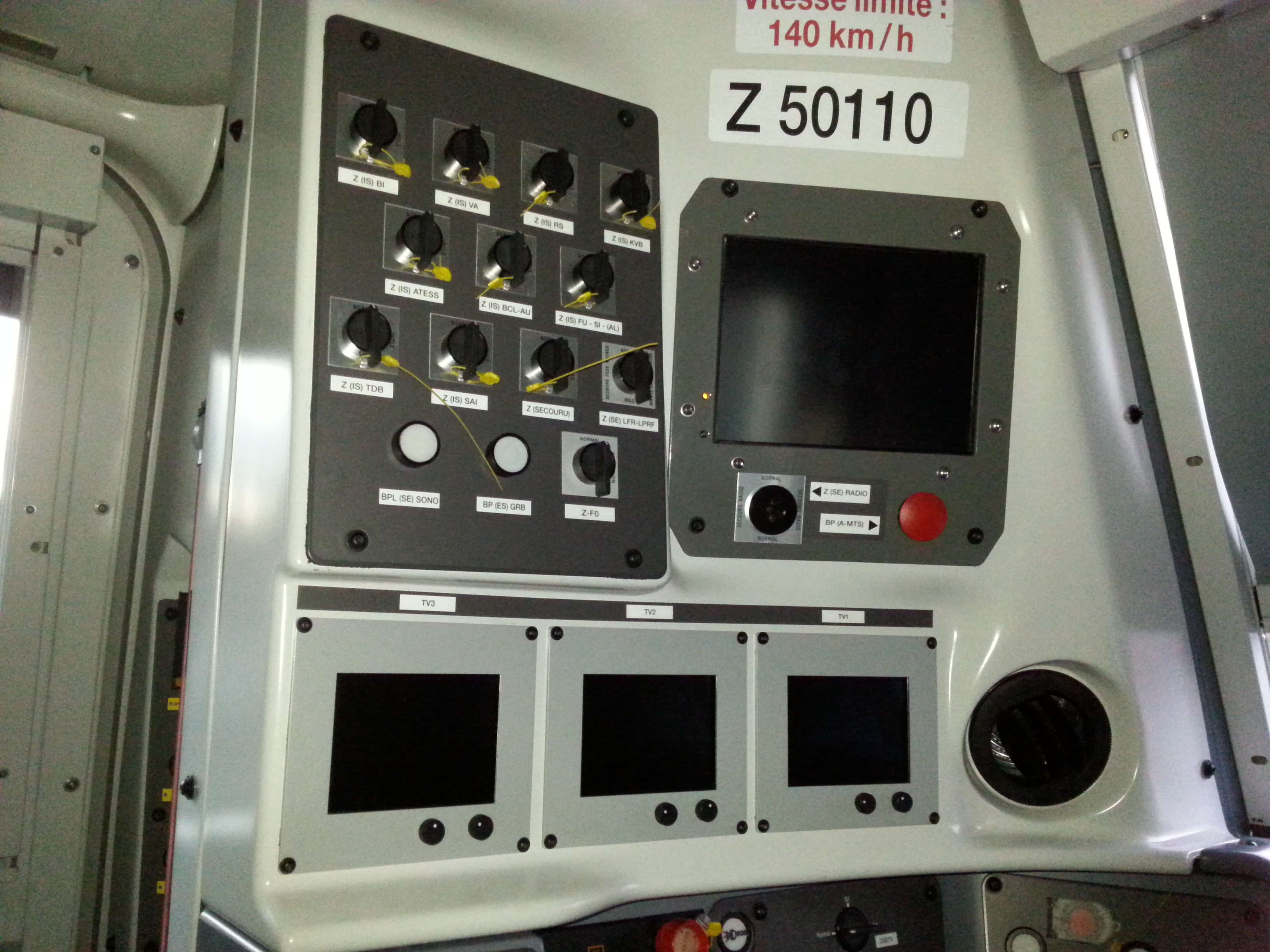 Zoom sur les EAS situés à gauche d'un conducteur de Z50000.